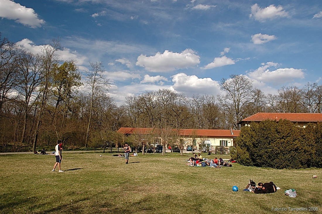 La Fagiana